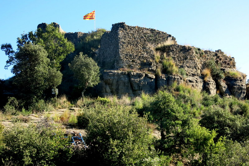 castell d' Hostoles a Sant Feliu de Pallerols _ Garrotxa - Catalunya